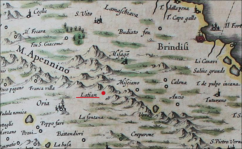 Latiano e zone limitrofe nel XVII sec.